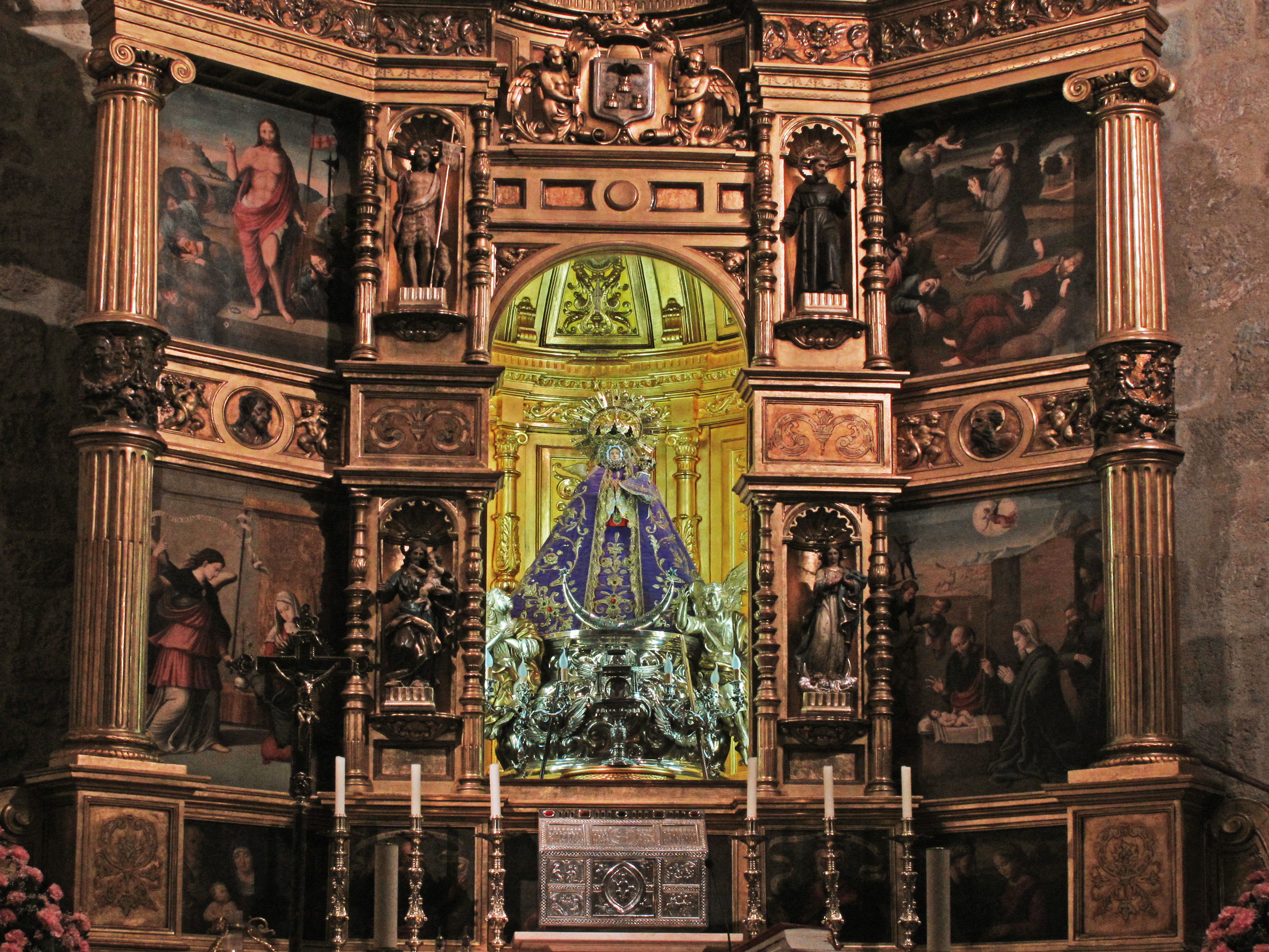 Situada en la capilla que lleva su nombre a la derecha del Altar de la Catedral de Albacete y que nunca abandona, en ella se encuentra el retablo renacentista con tablas del Maestro de Albacete La Anunciación, La Adoración de los Pastores, La Oración en el Huerto y la Resurrección